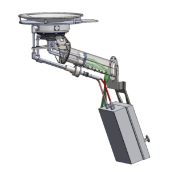 Parker Solar Probe Diagram instrument SWEAP-SPC